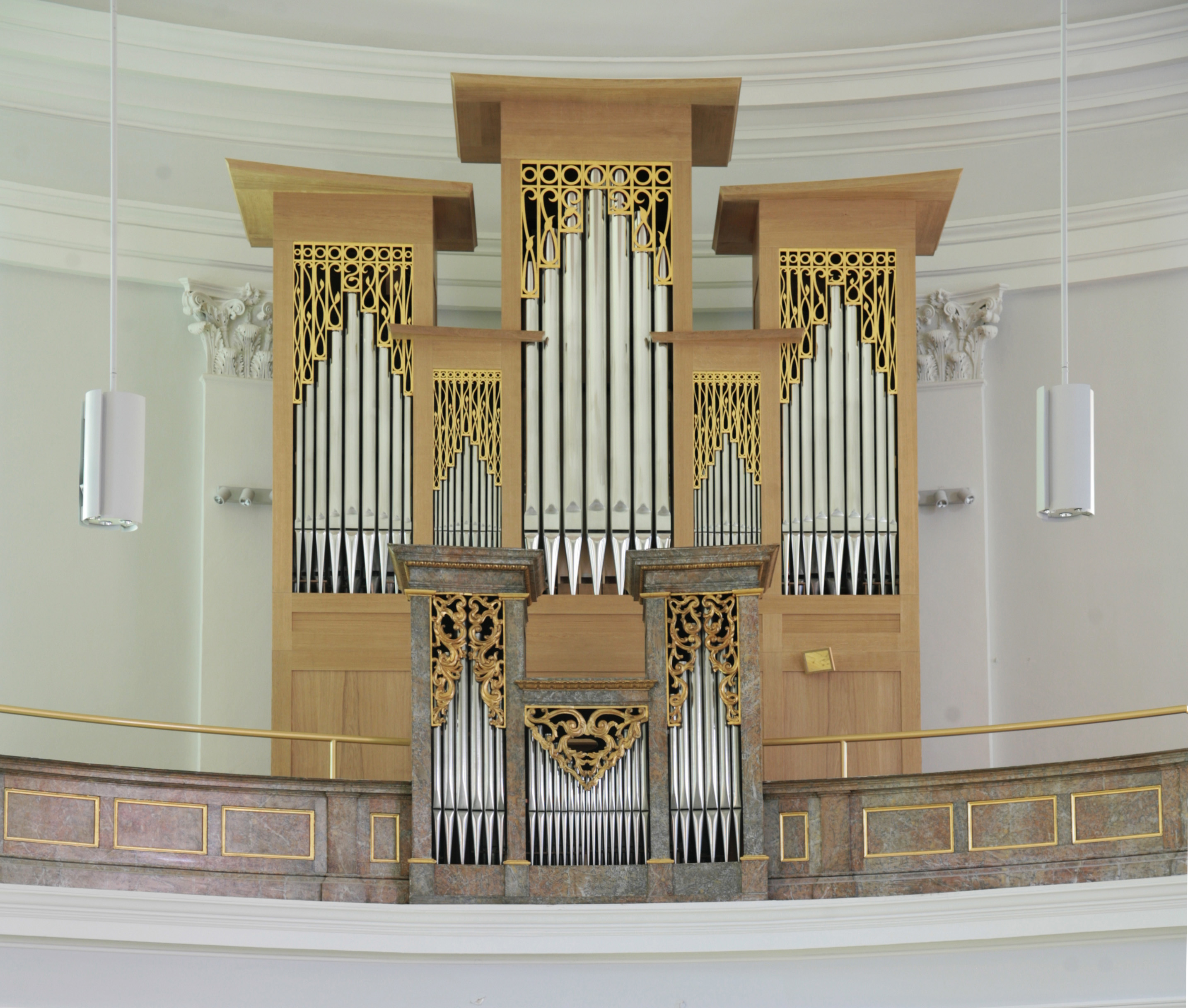 Orgel der Pfarrkirche Inzersdorf, Wien, Österreich